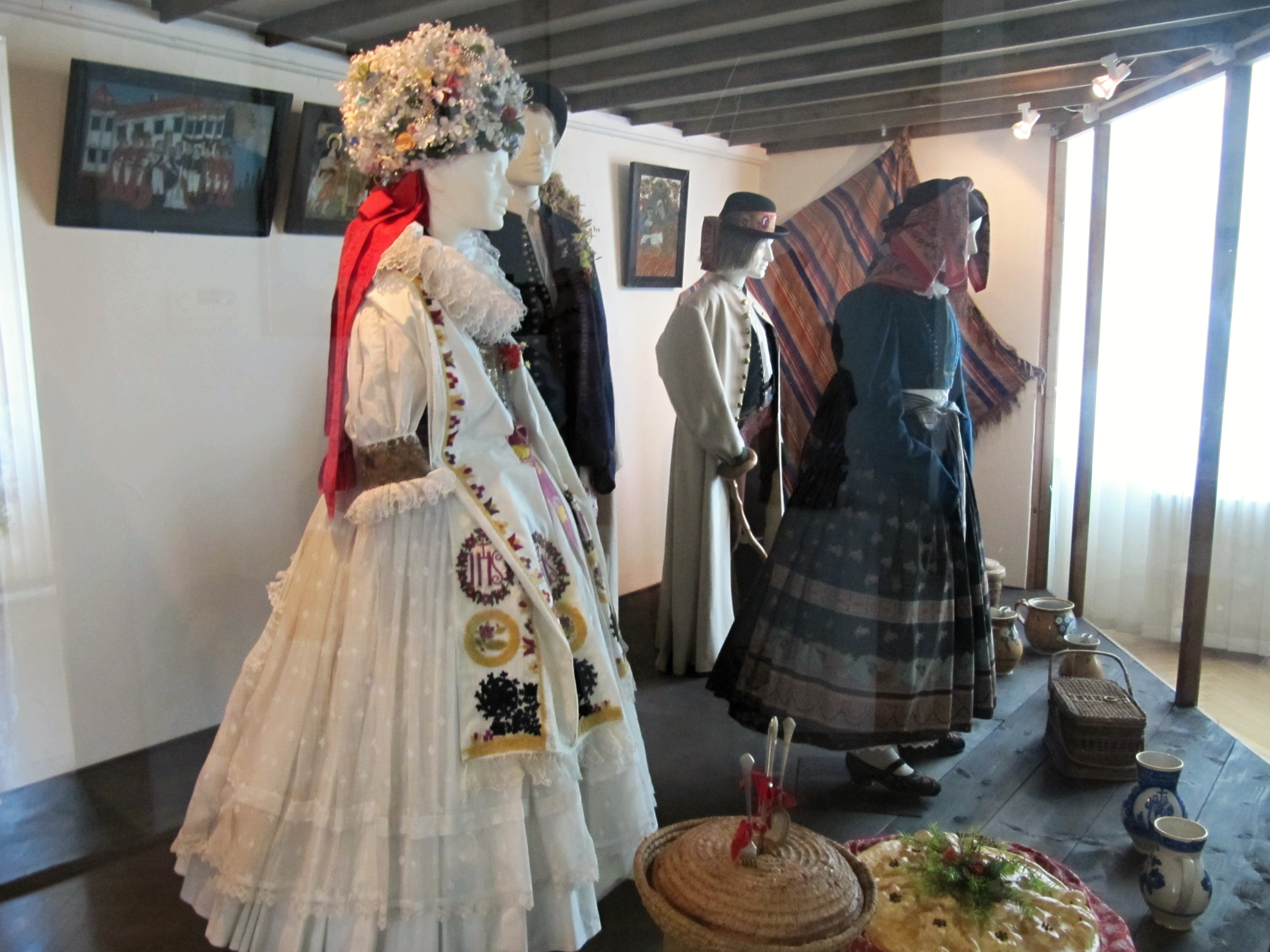 Muzeum Komenského Přerov